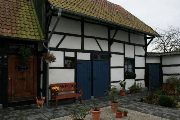 Fachwerkhaus in Wegberg-Kipshoven